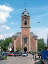 De Sint-Stefanus kerk in Mollem.